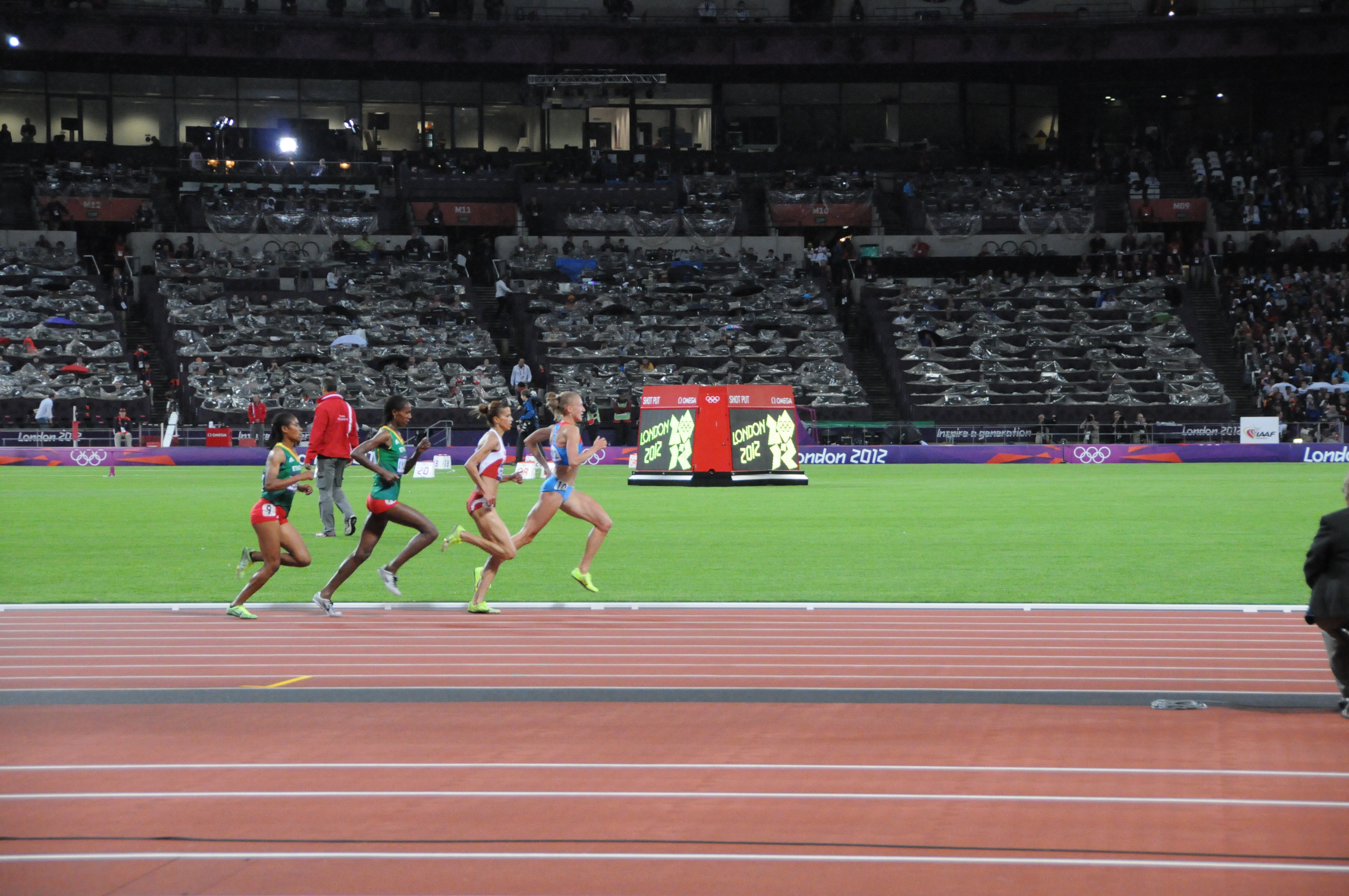 Course du 3000m steeple des JO de Londres. Sofia Assefa, Habiba Ghribi, Hiwot Ayalew, Yuliya Zaripova